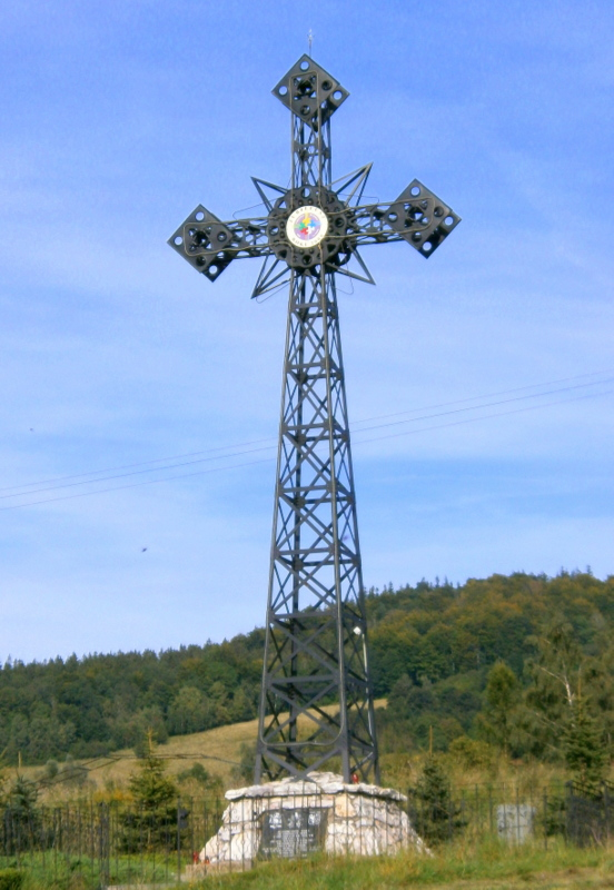 Wojcieszów, krzyż milenijny